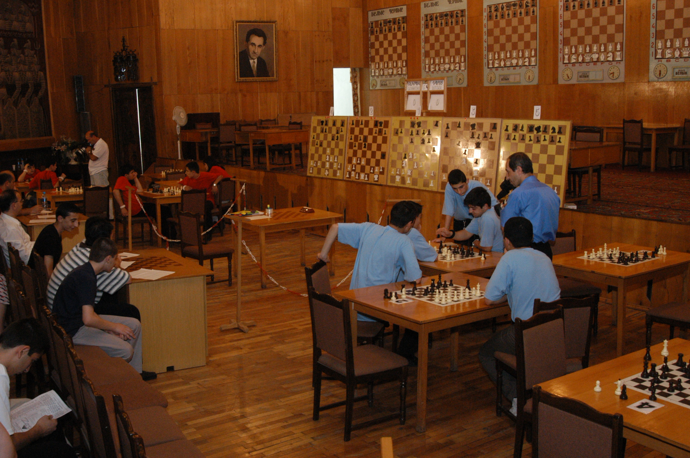 Деловые шахматы - Общий вид партии в деловые шахматы